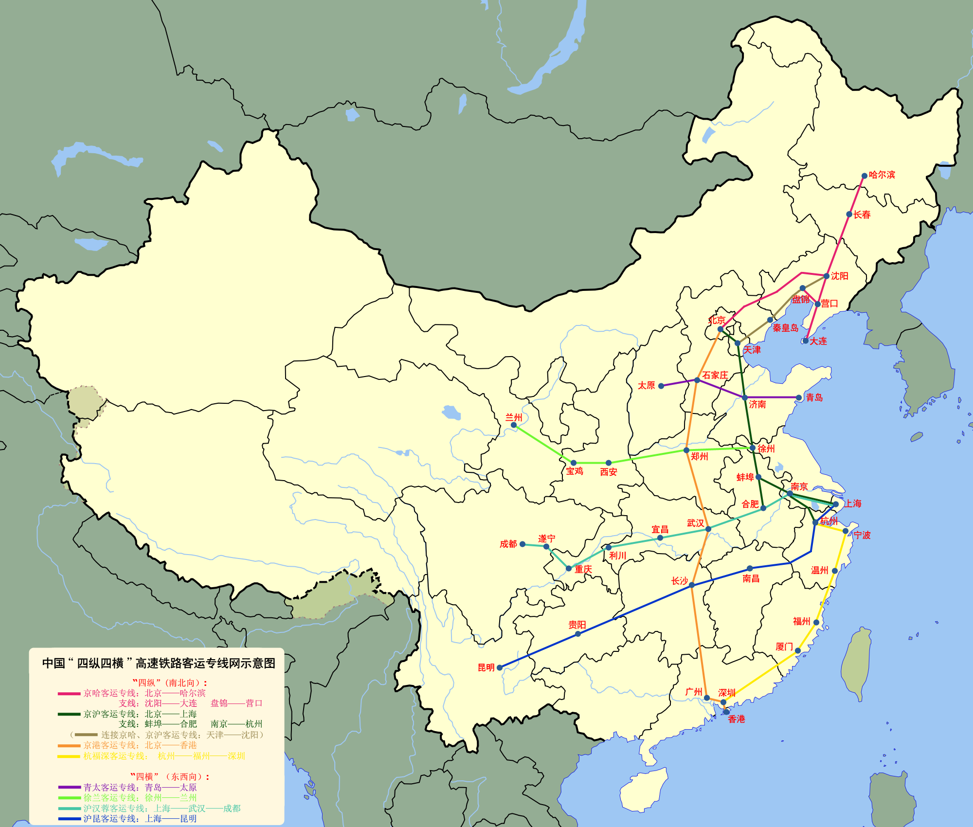 中国“四纵四横”高速铁路客运专线示意图